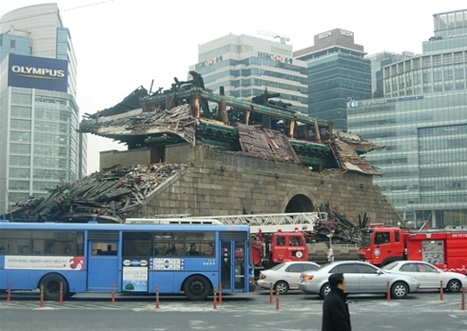 2008년 숭례문 화재 사고 발생 다음 날 불에 타버린 숭례문이 출근길을 맞는다